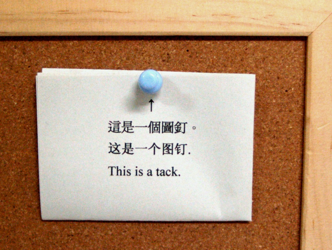 圖釘